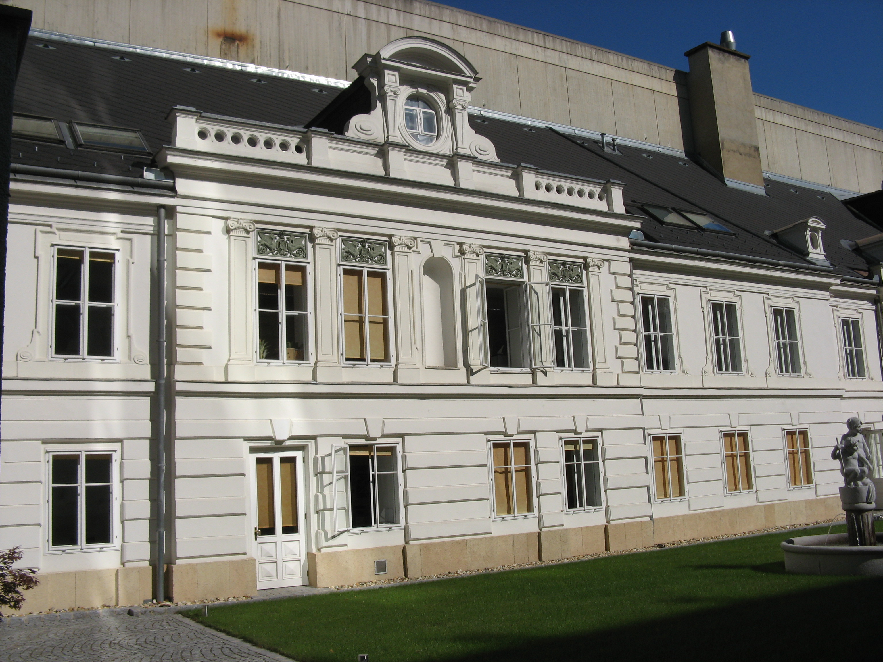 Palais Erzherzog Carl Ludwig, Favoritenstraße 7, Wien-Wieden